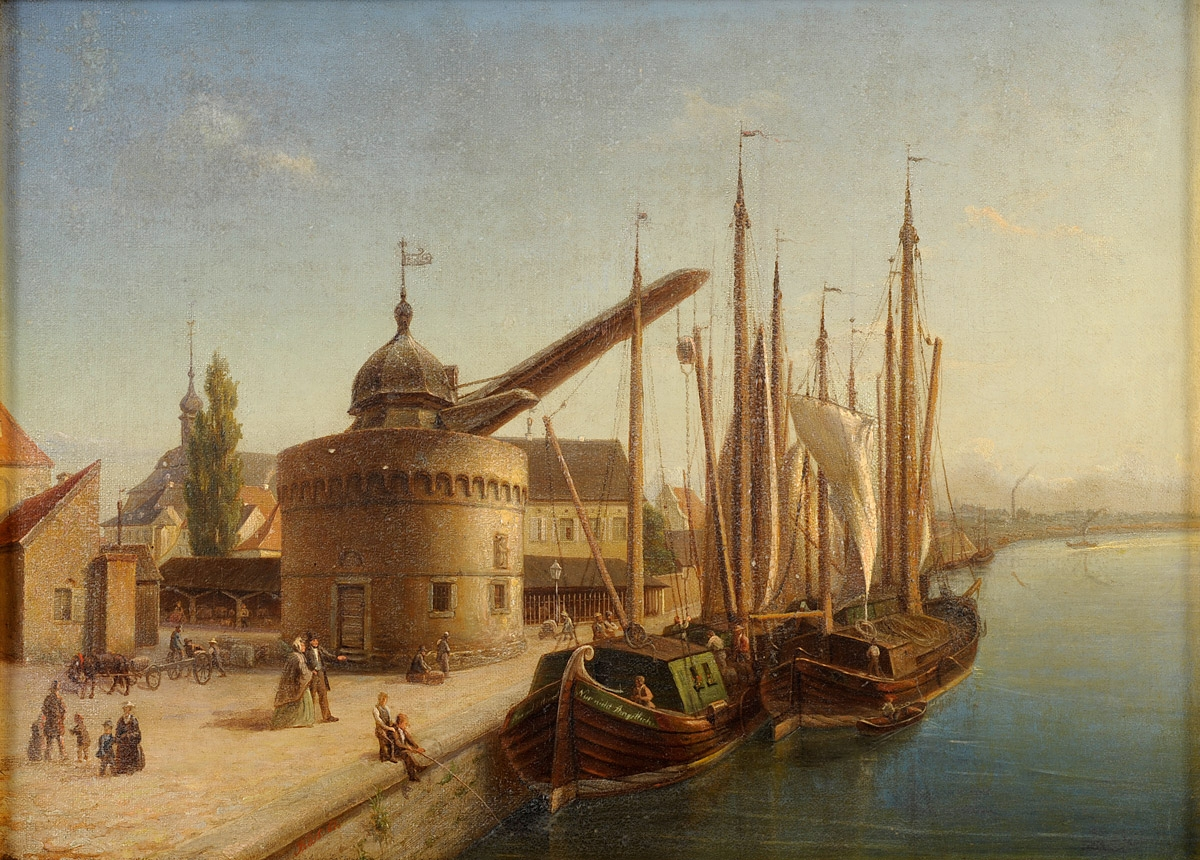 Düsseldorfer Stadtansicht. Signiert. Datiert 1861. Öl auf Leinwand, je 33 x 45 cm